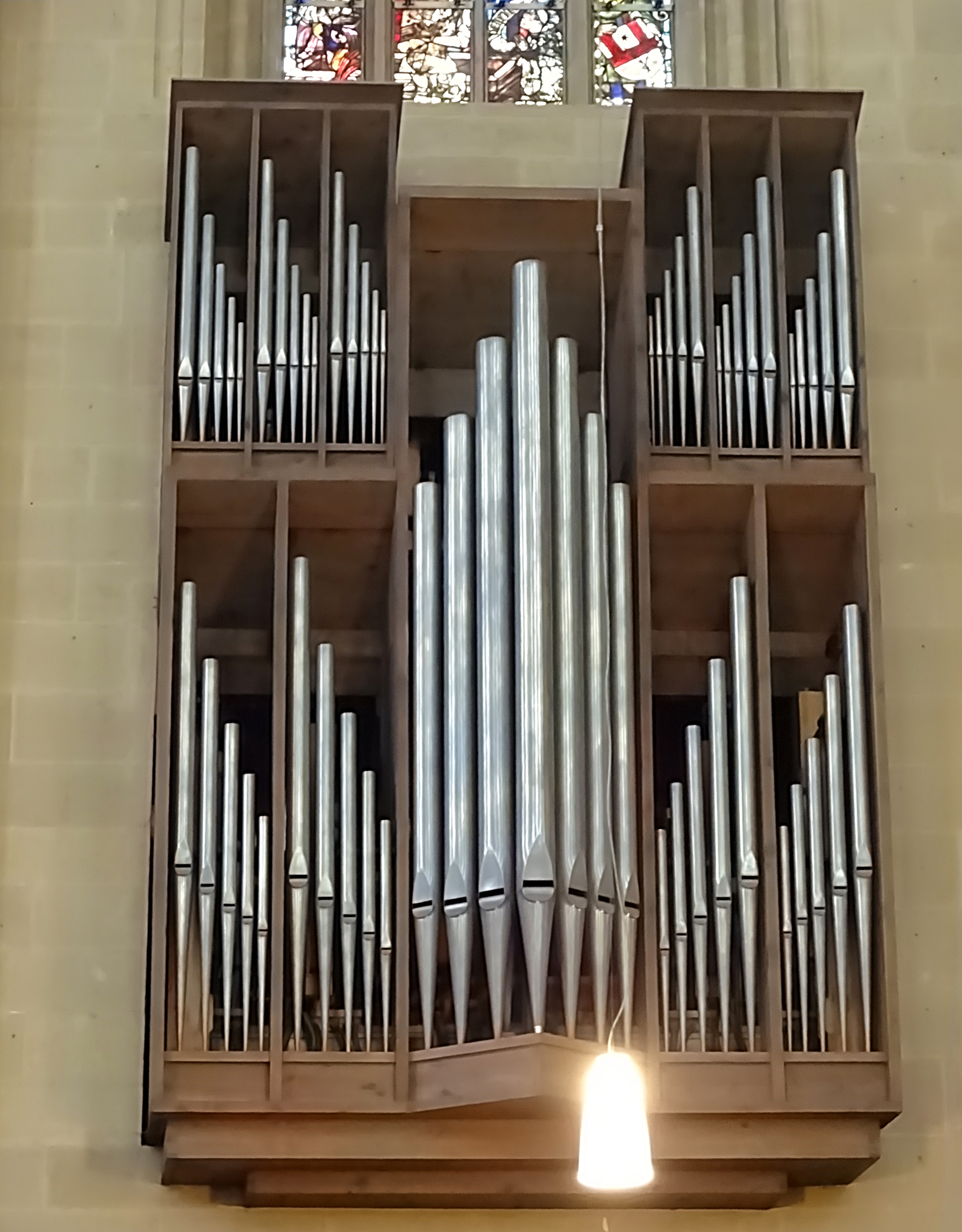 Chororgel von Schuke Orgelbau (1963 II/P29) im Erfurter Dom St. Marien